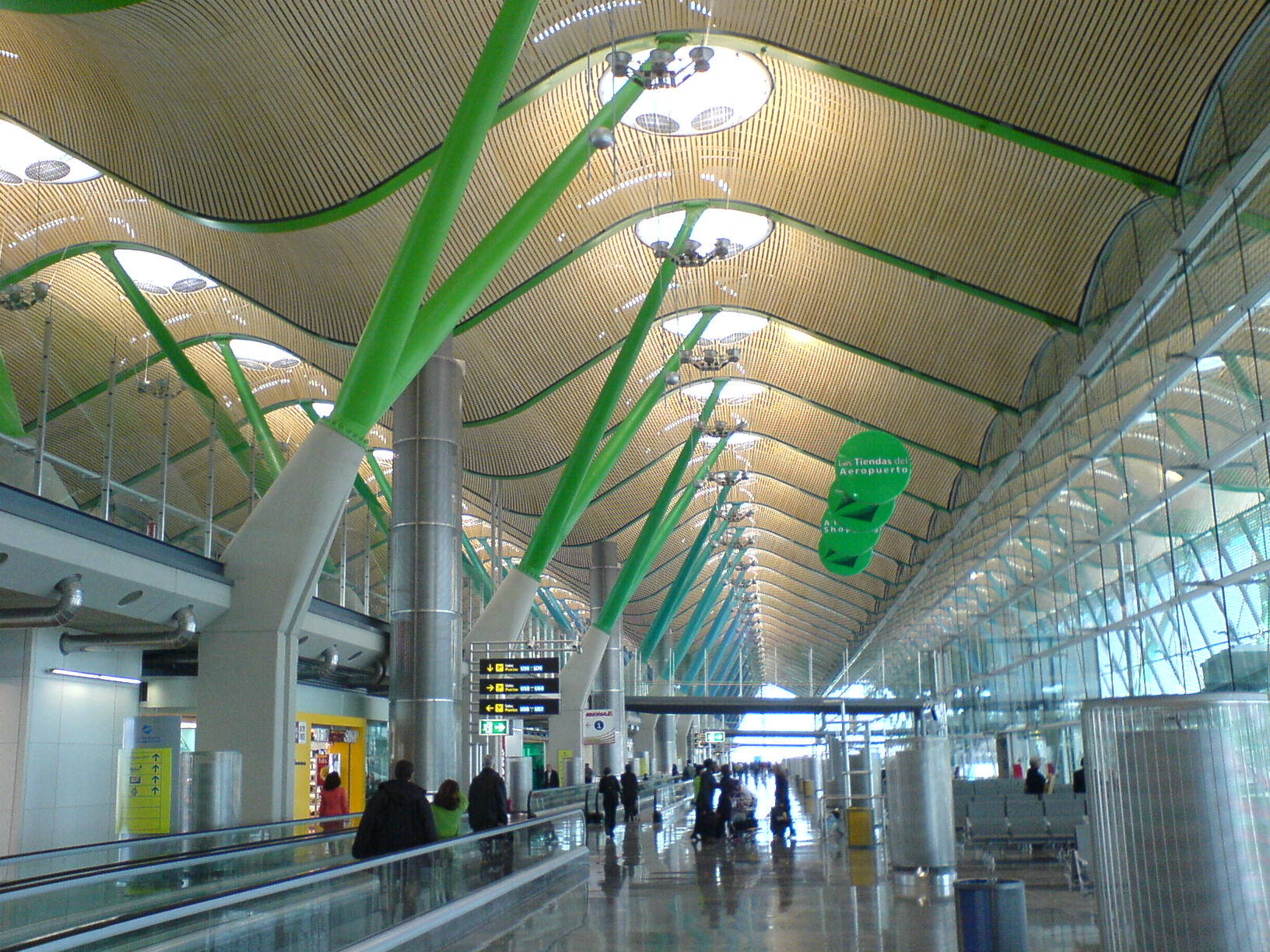 Imagen tomada en la terminal 4 del Aeropuerto de Madrid-Barajas / Image taken at the Terminal 4 of Madrid-Barajas Airport